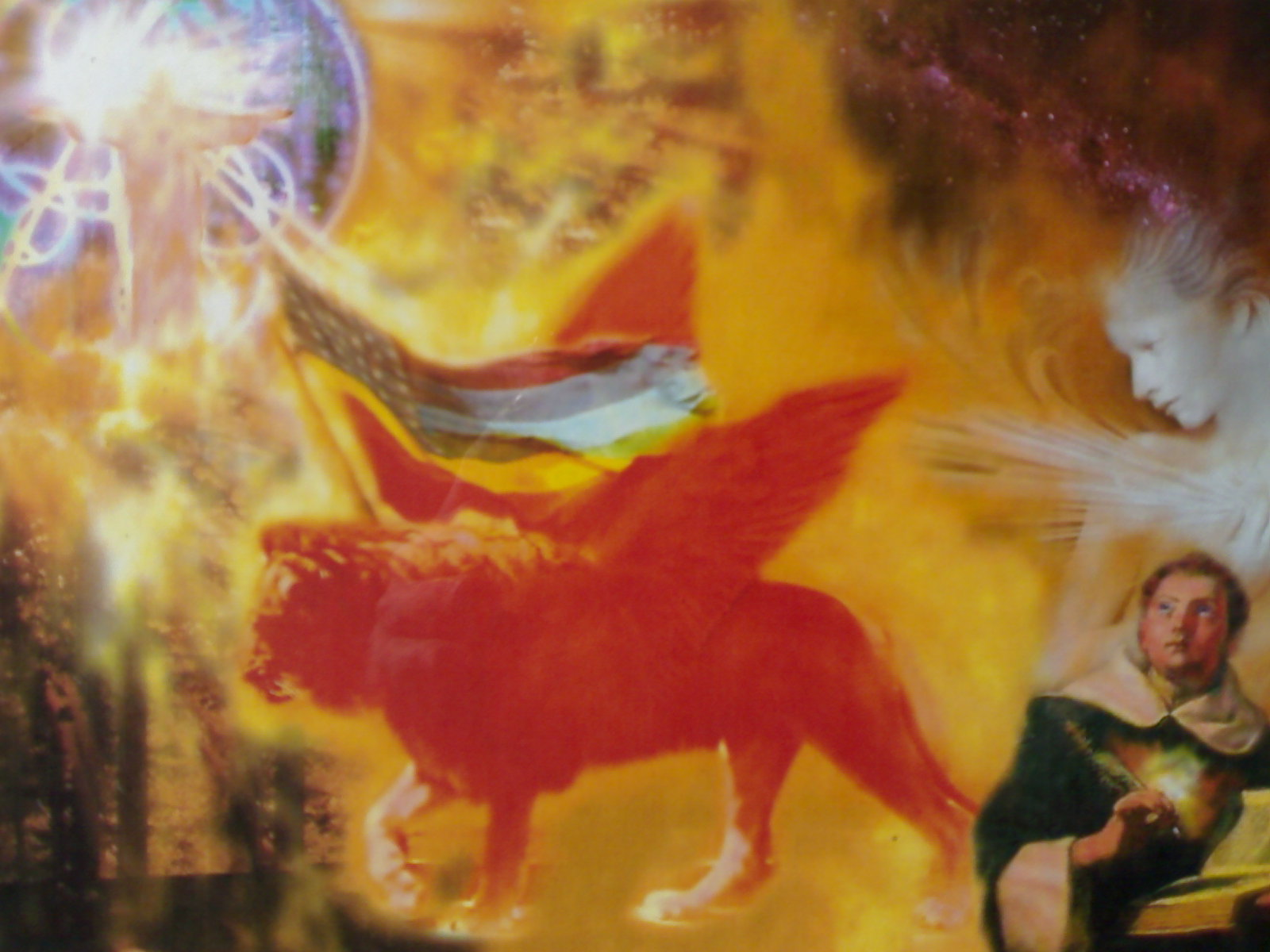 "Homo Theologie", Symbool van de Homotheologie: de gevleugelde roze leeuw met de Gay Pride vlag, door Renze Reinier de Weerdt, 2006